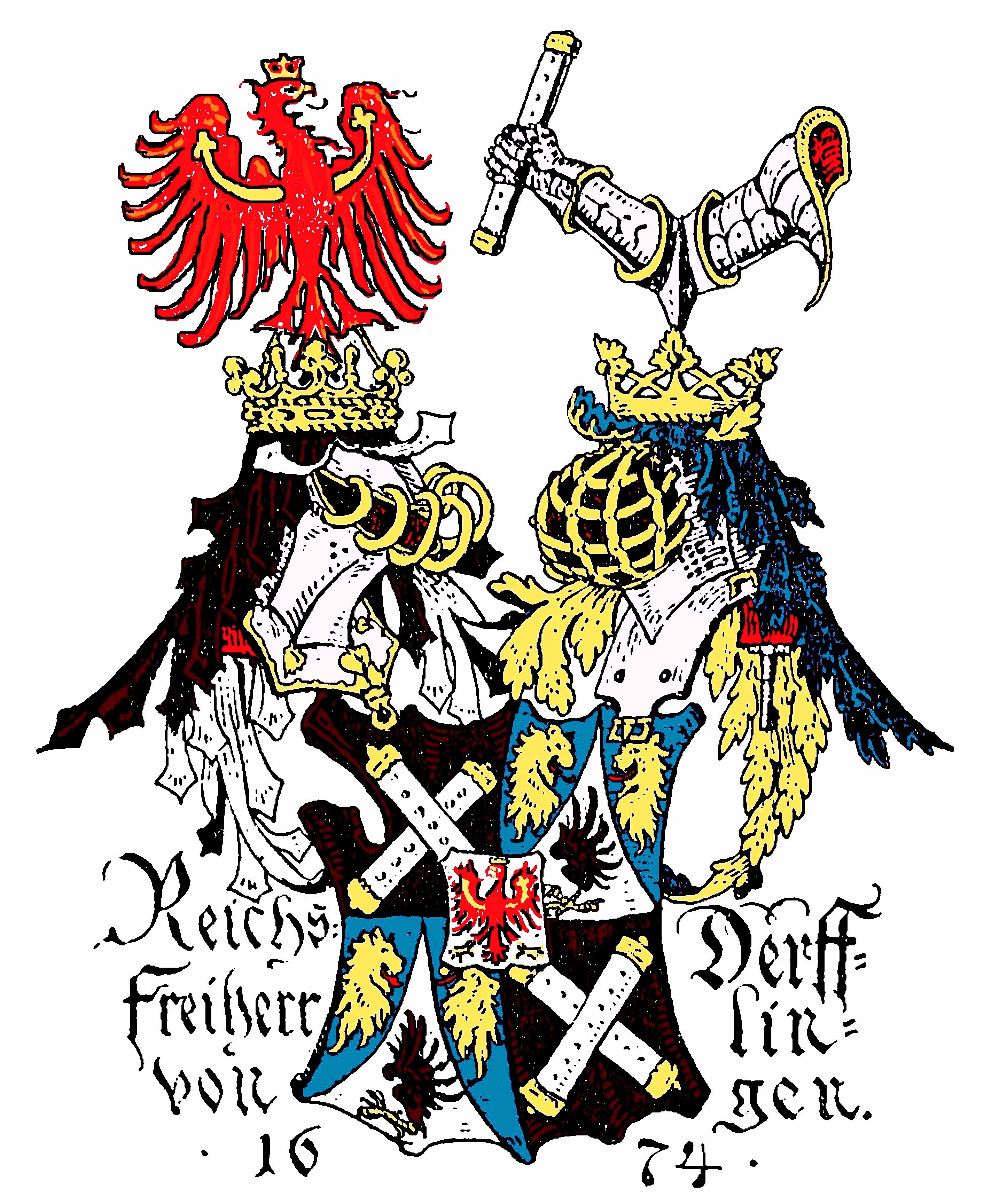 Wappen Freiherr von Derfflingen, gemäß Blasonierung des Diploms von 1674 selbst koloriert